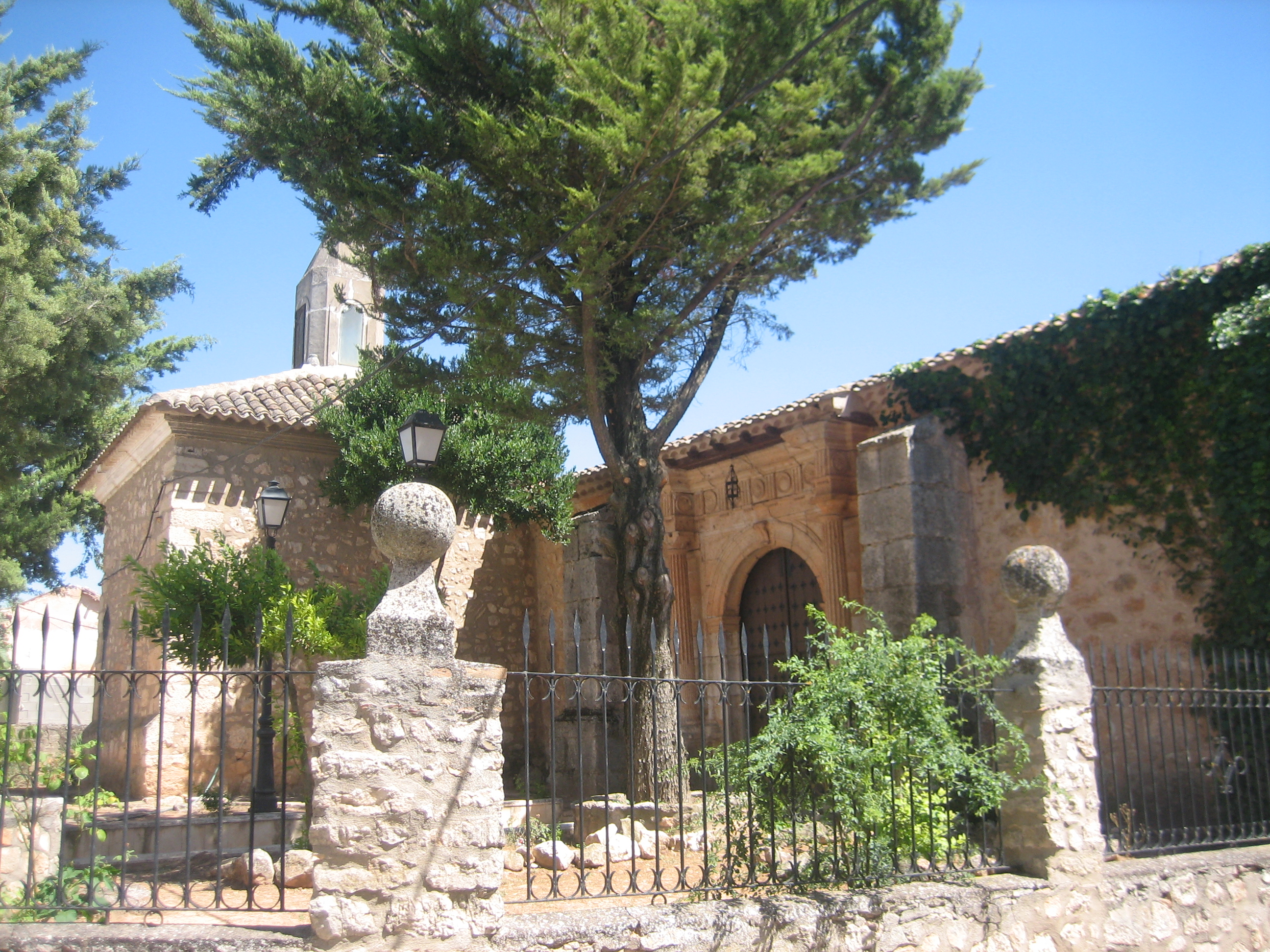 Vista exterior de la Iglesia de la Asunción de Atalaya del Cañavate